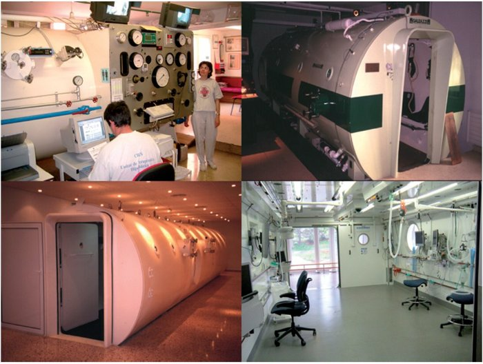 Collage de 4 cámaras hiperbárica multiplaza